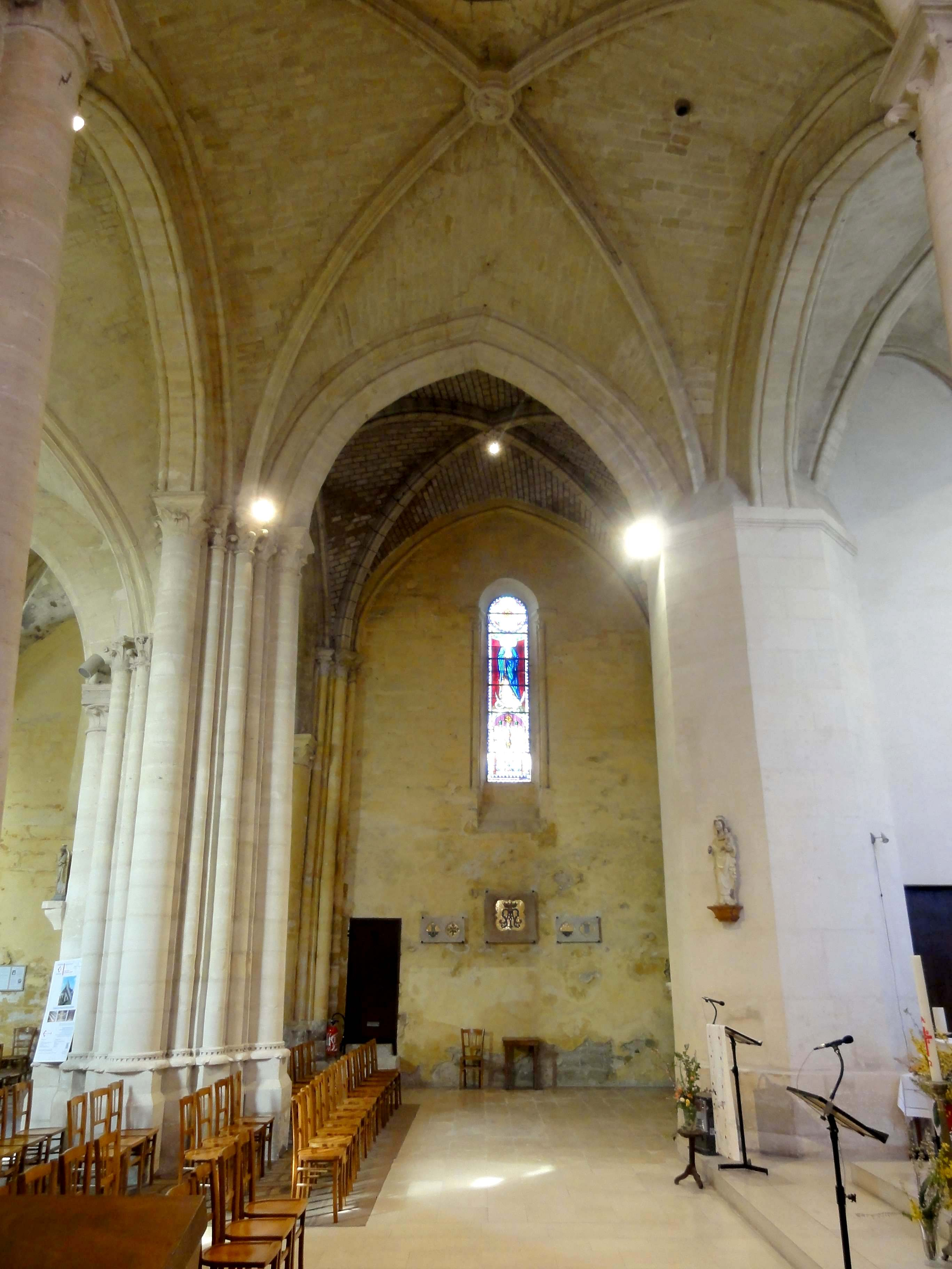 Intérieur de l'église - voir titre.